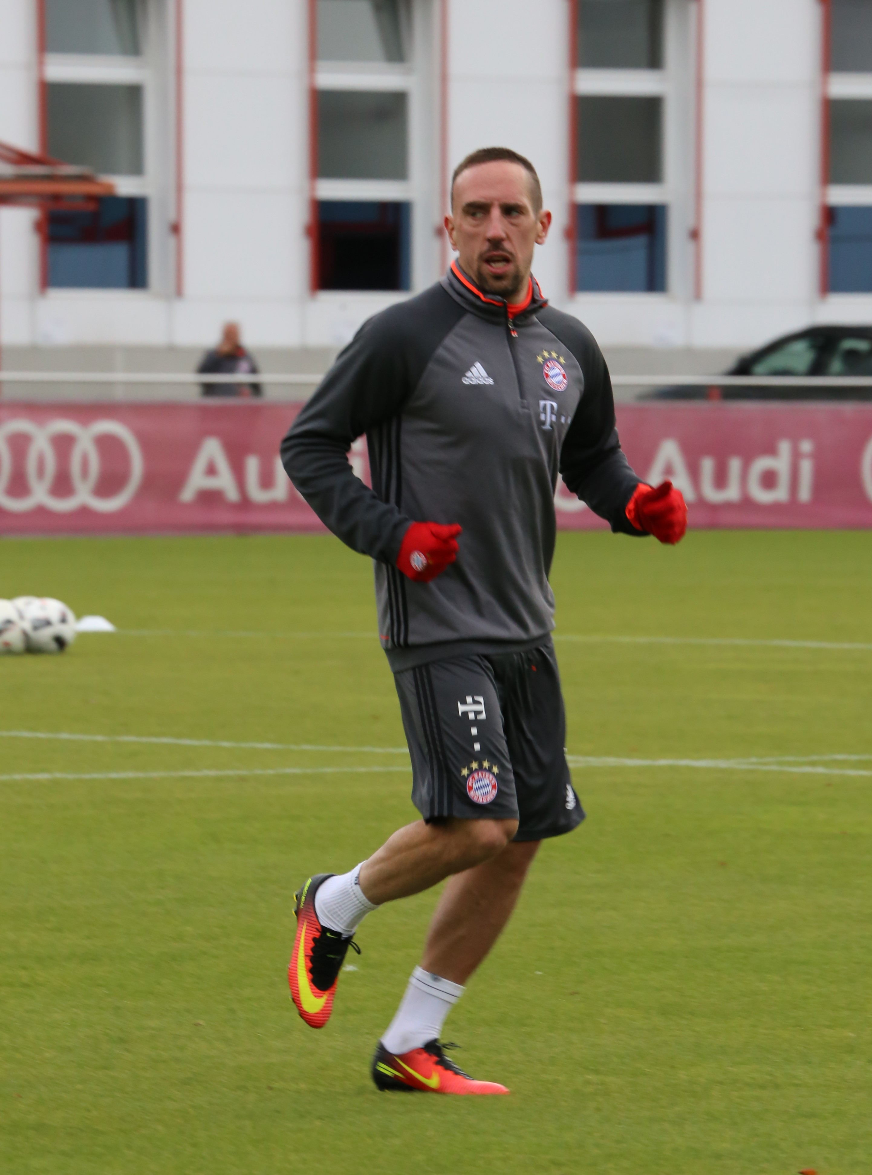 Franck Ribéry beim Training auf dem Gelände des FC Bayern München (November 2016)